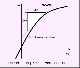 Darstellung einer Linearisierung im Arbeitspunkt einer nichtlinearen Funktion